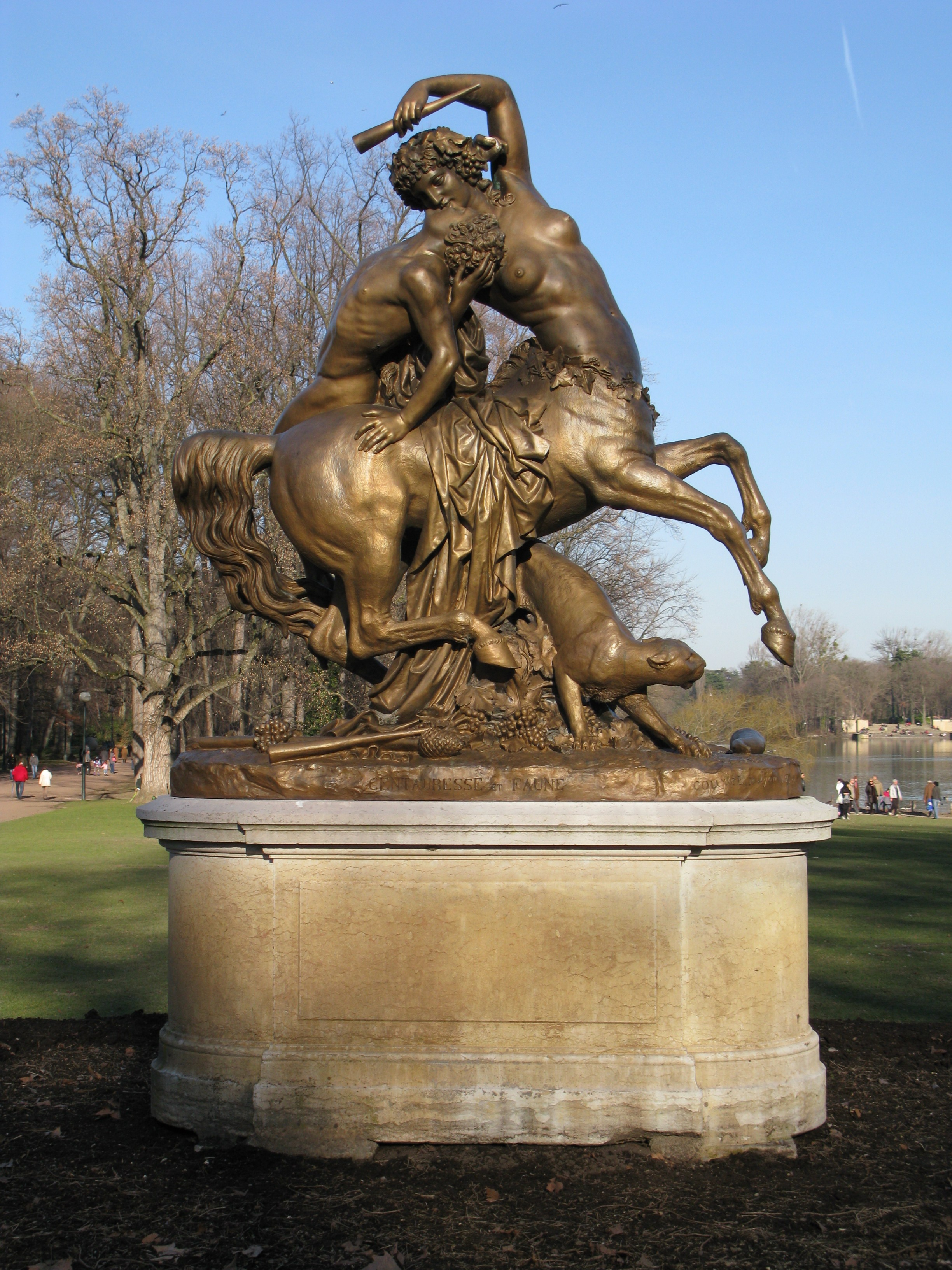 "Centauresse et Faune", Œuvre d'Augustin Courtet dans le parc de la tête d'or à Lyon.